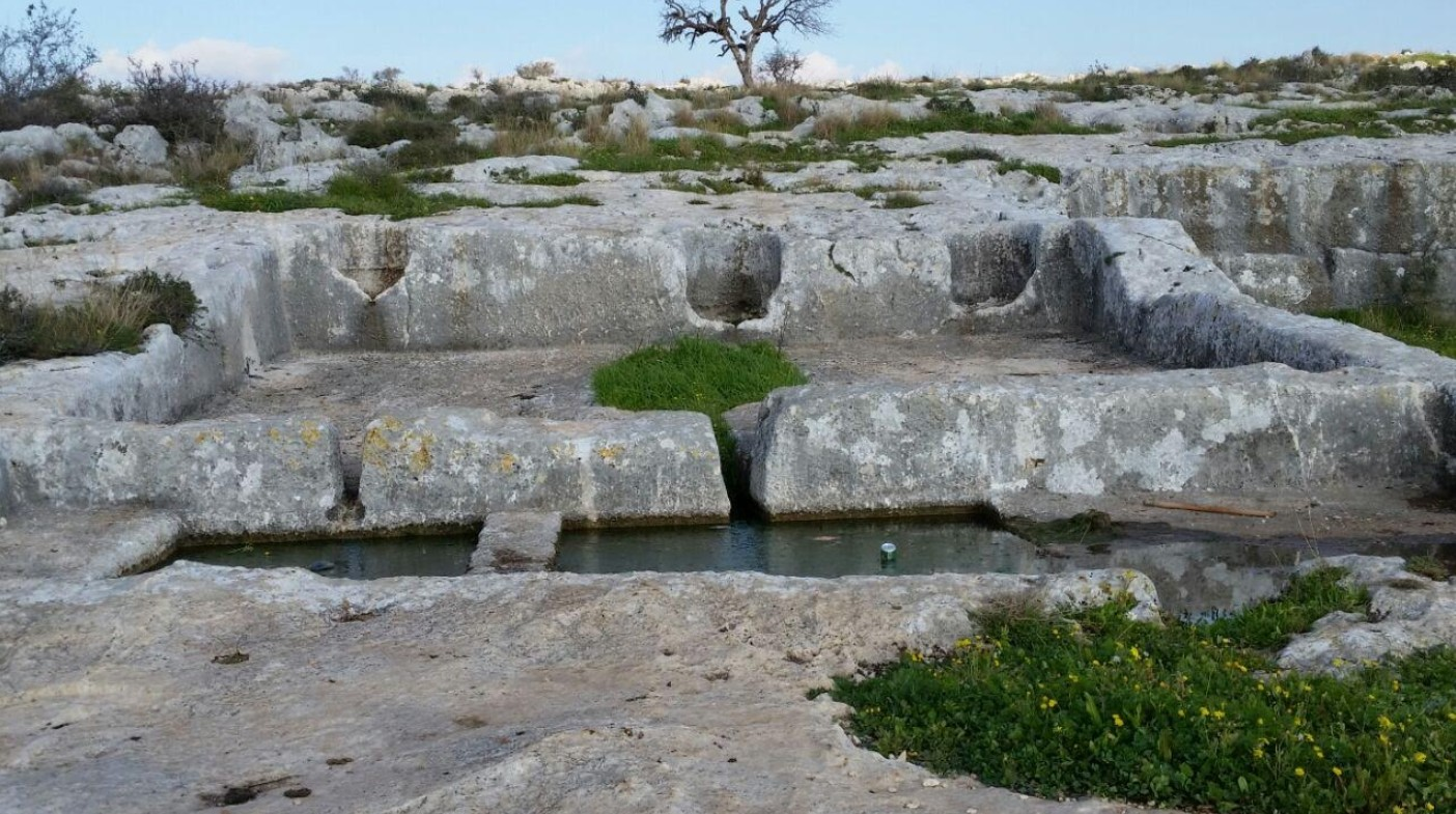 הגת המרכזית באתר גתות ברקן